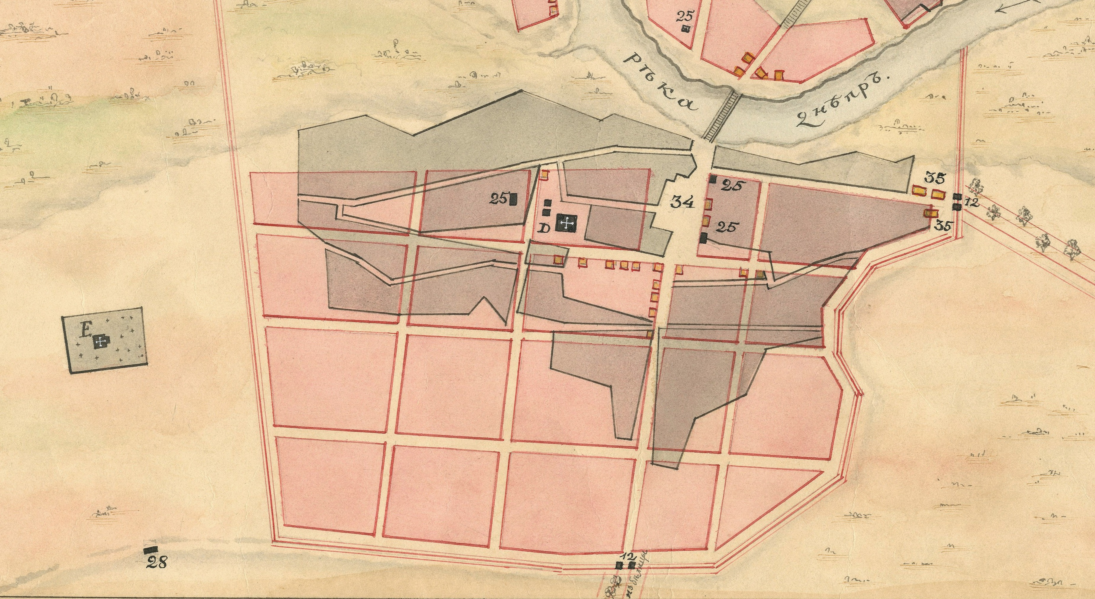 Беларуская (тарашкевіца): Магілёў (Магілёў). Плян места